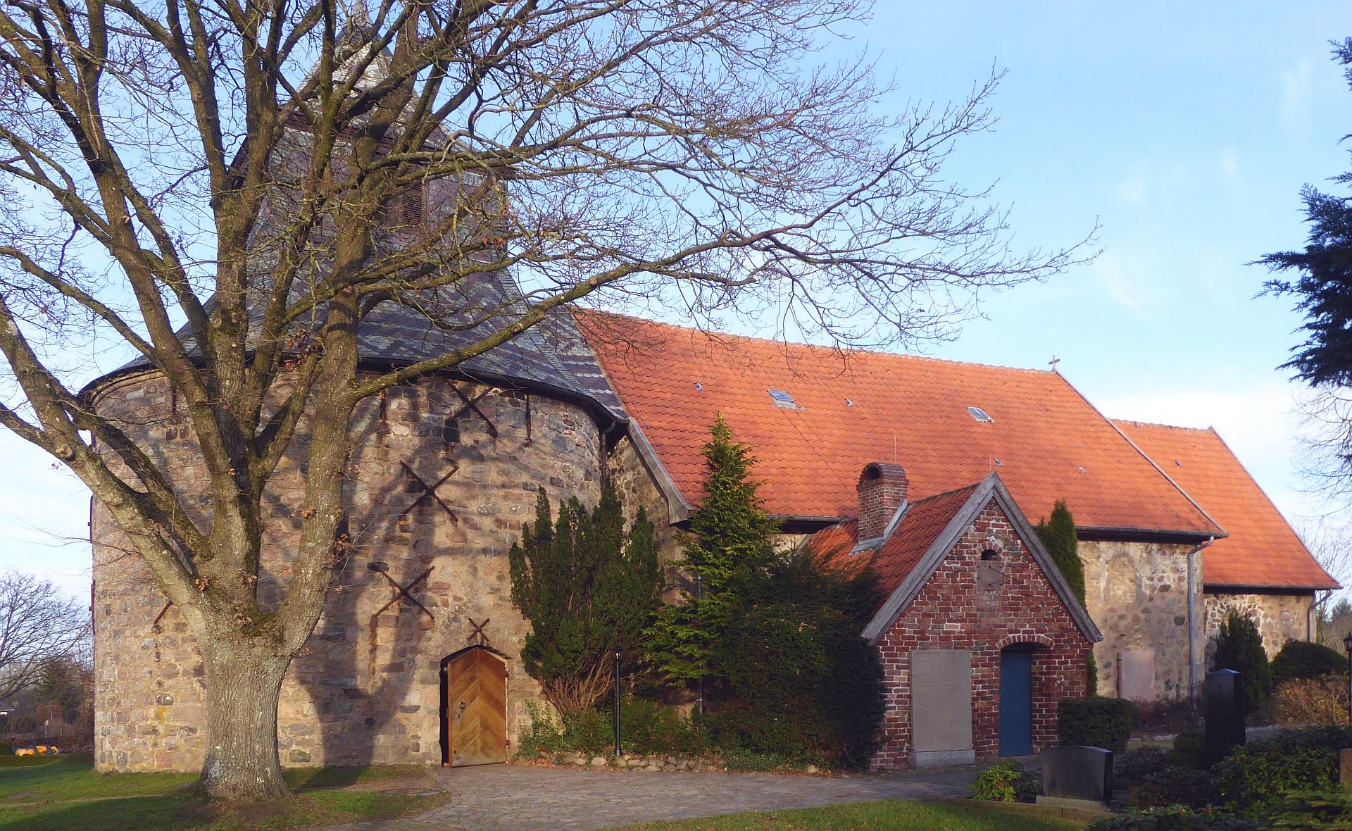 Oeversee romanische St.-Georg-Kirche, eine Feldsteinkirche mit Rundturmportal aus Natursteinquadern - Foto 2018 Wolfgang Pehlemann P1280556